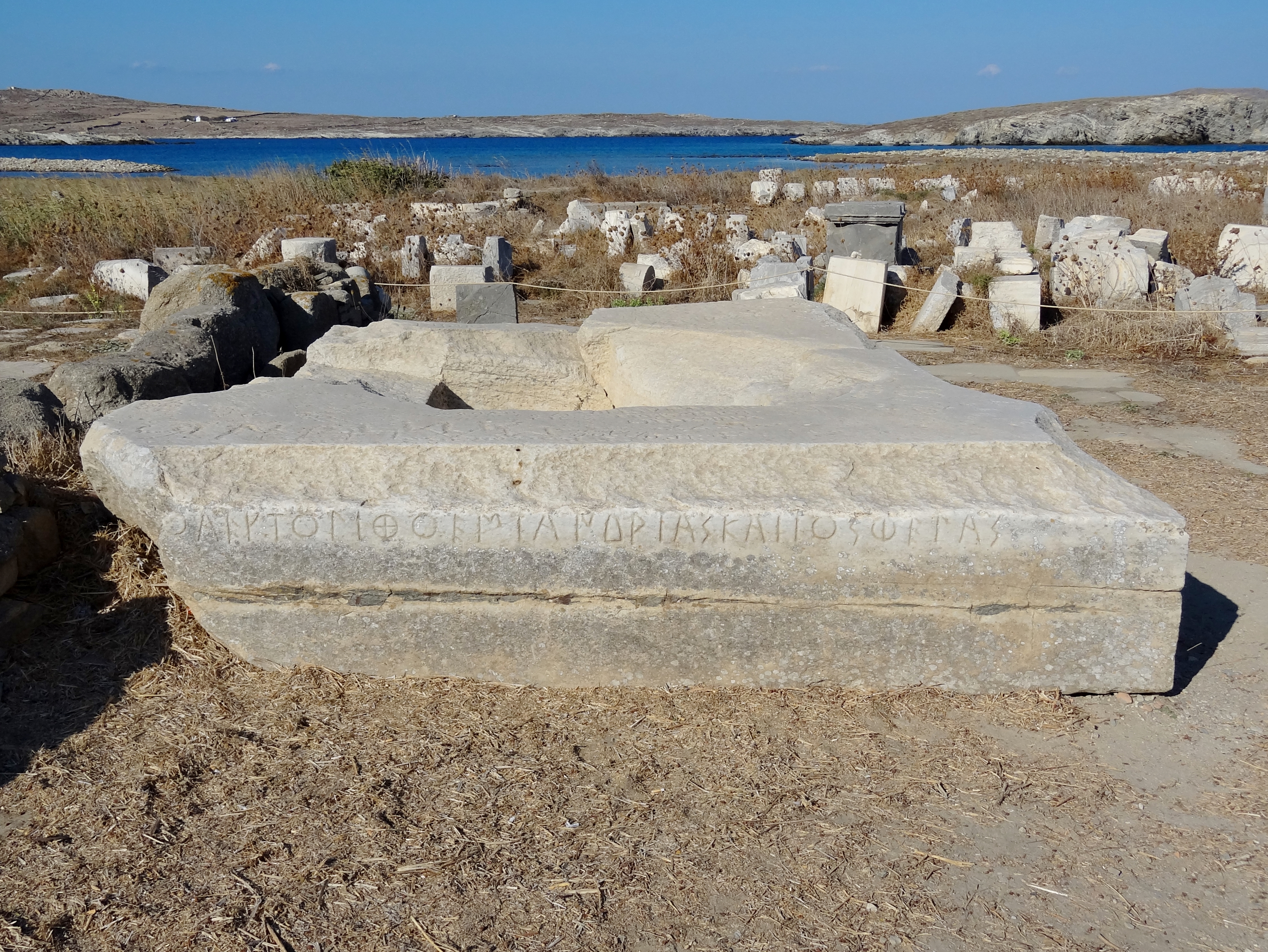 Basis des Kolosses der Naxier in der Ausgrabungsstätte von Delos, Kykladen, Griechenland